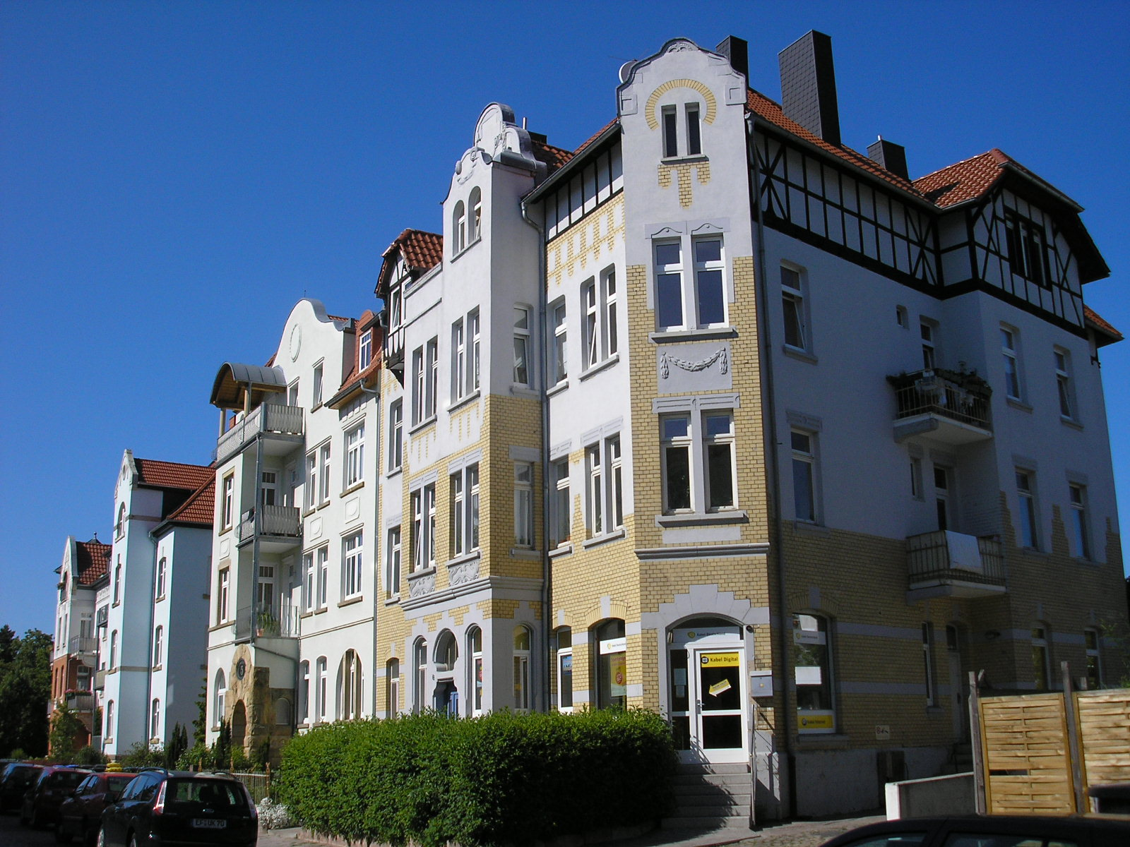 Häuserzeile in der Straße Am Stadtpark in Erfurt.